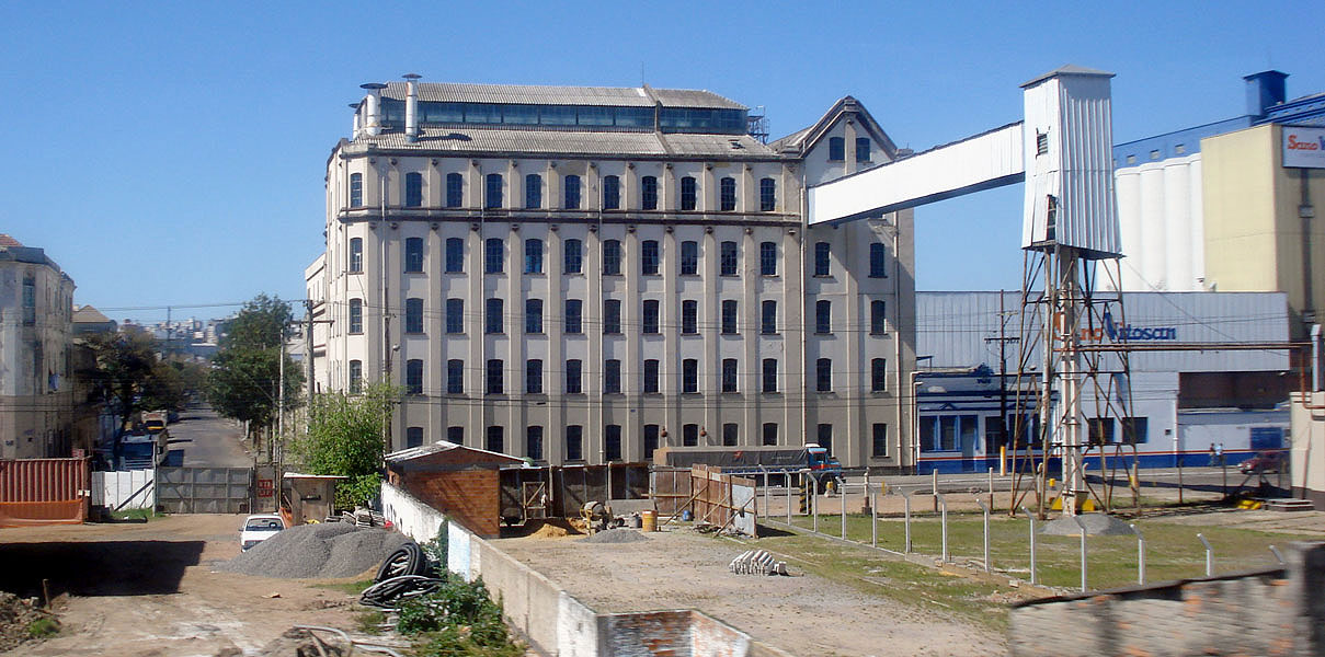 O prédio do antigo Moinho Rio Grandense, em Porto Alegre, RS, Brasil. Está situado na esquina da Rua Moura Azevedo com a Avenida Voluntários da Pátria, no bairro São Geraldo.